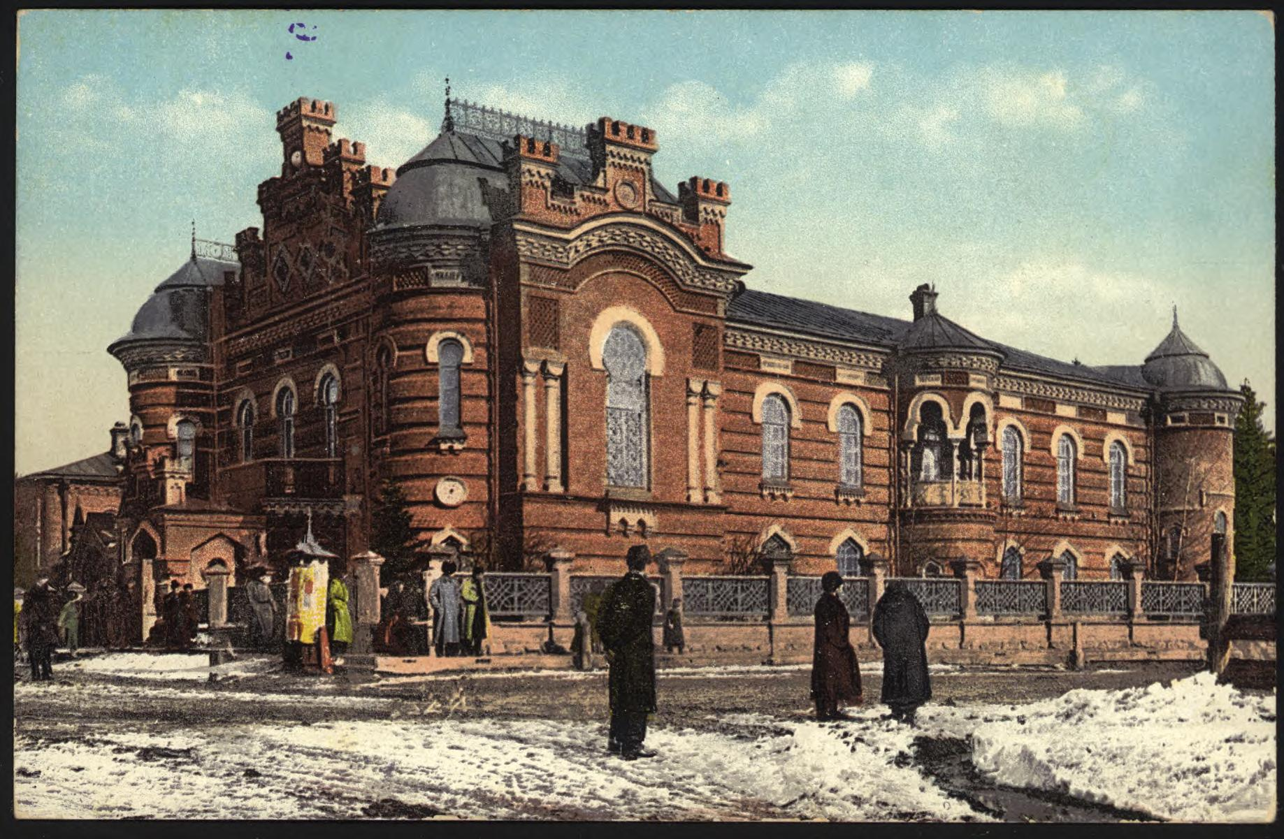 Иркутск. Музей.